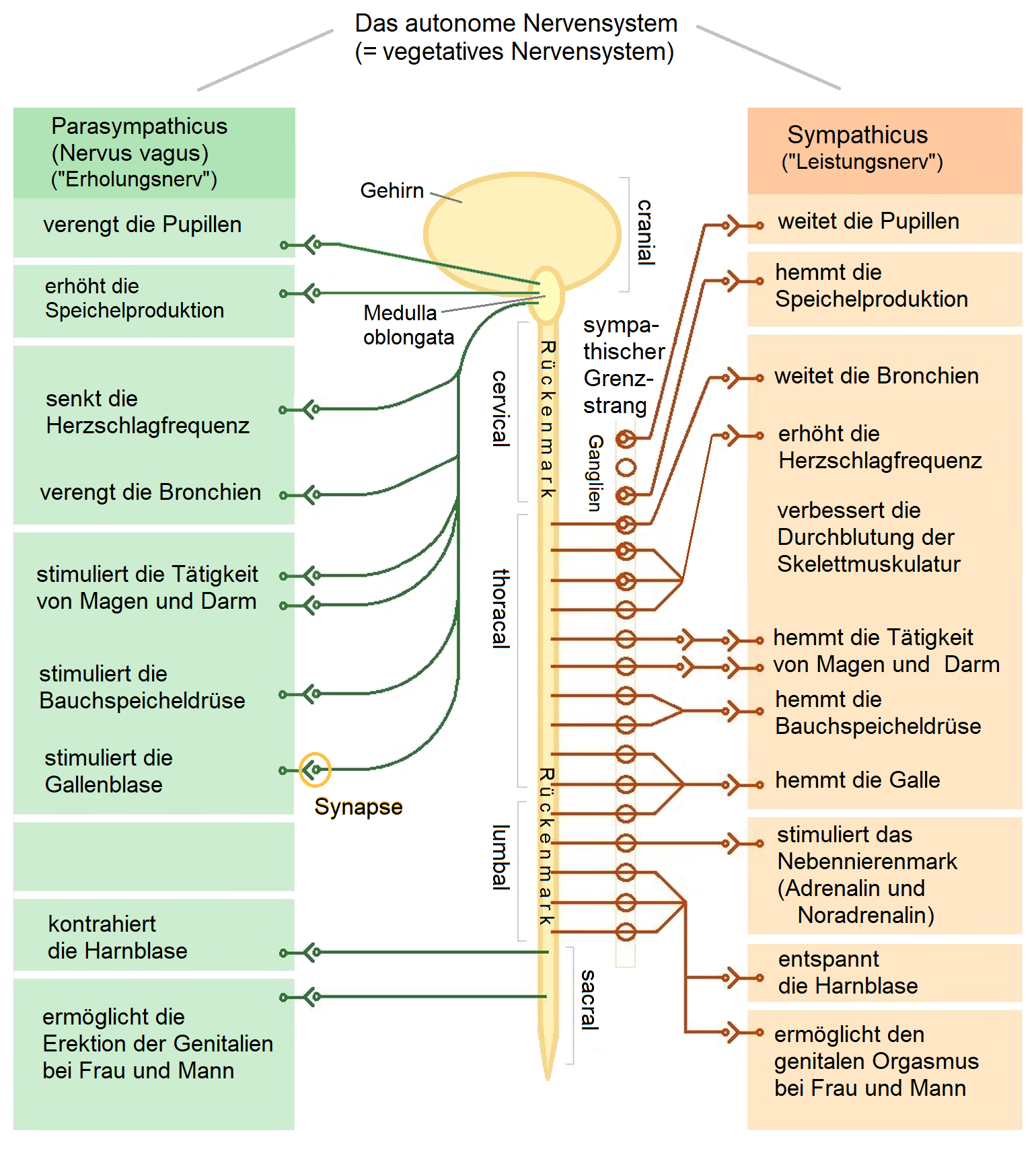 Vegetatives Nervensystem: Sympathicus und Parasympathicus und ihre antagonistische Wirkung auf die Zielorgane